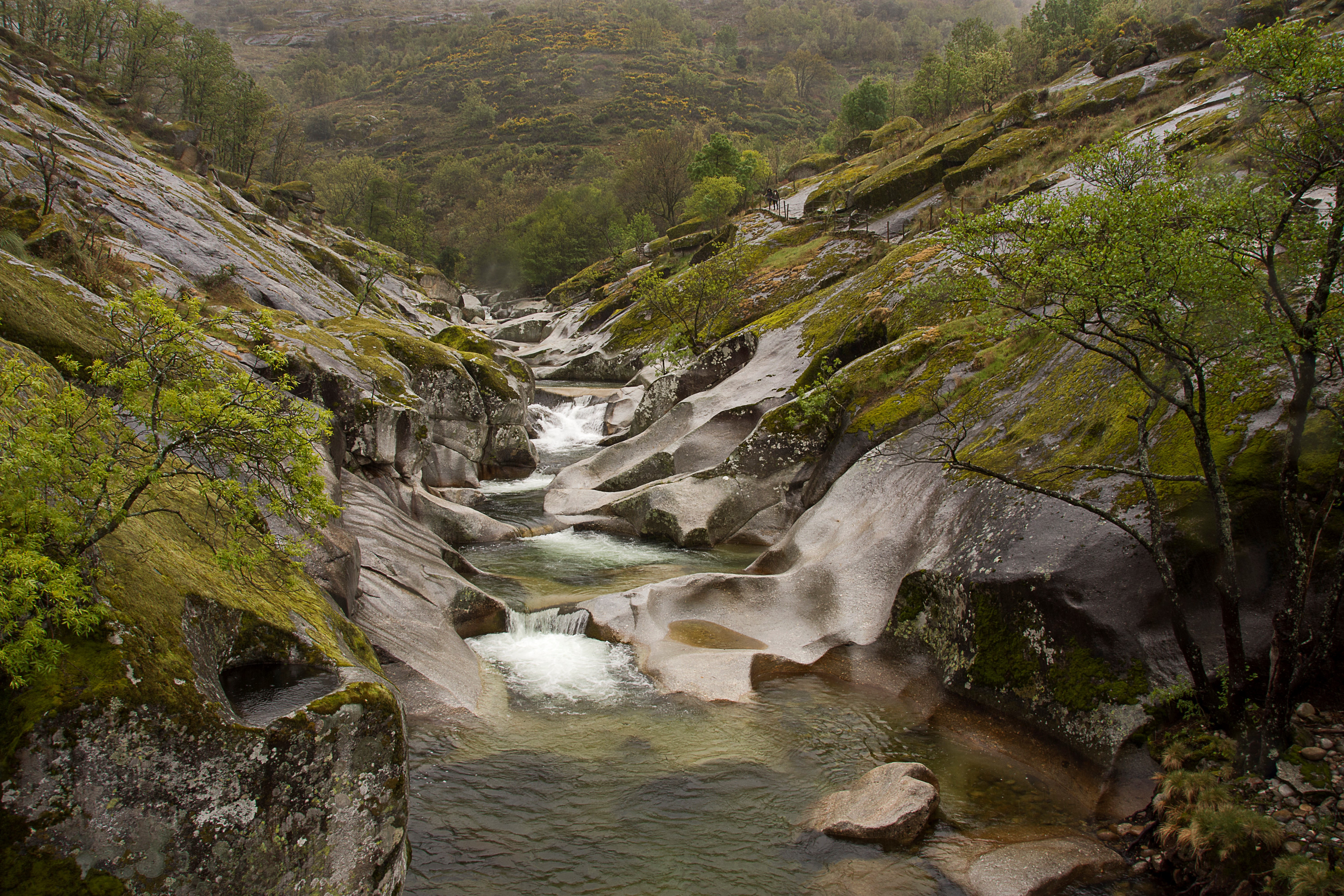 Los Pilones en la Garganta del infierno (Valle del Jerte)